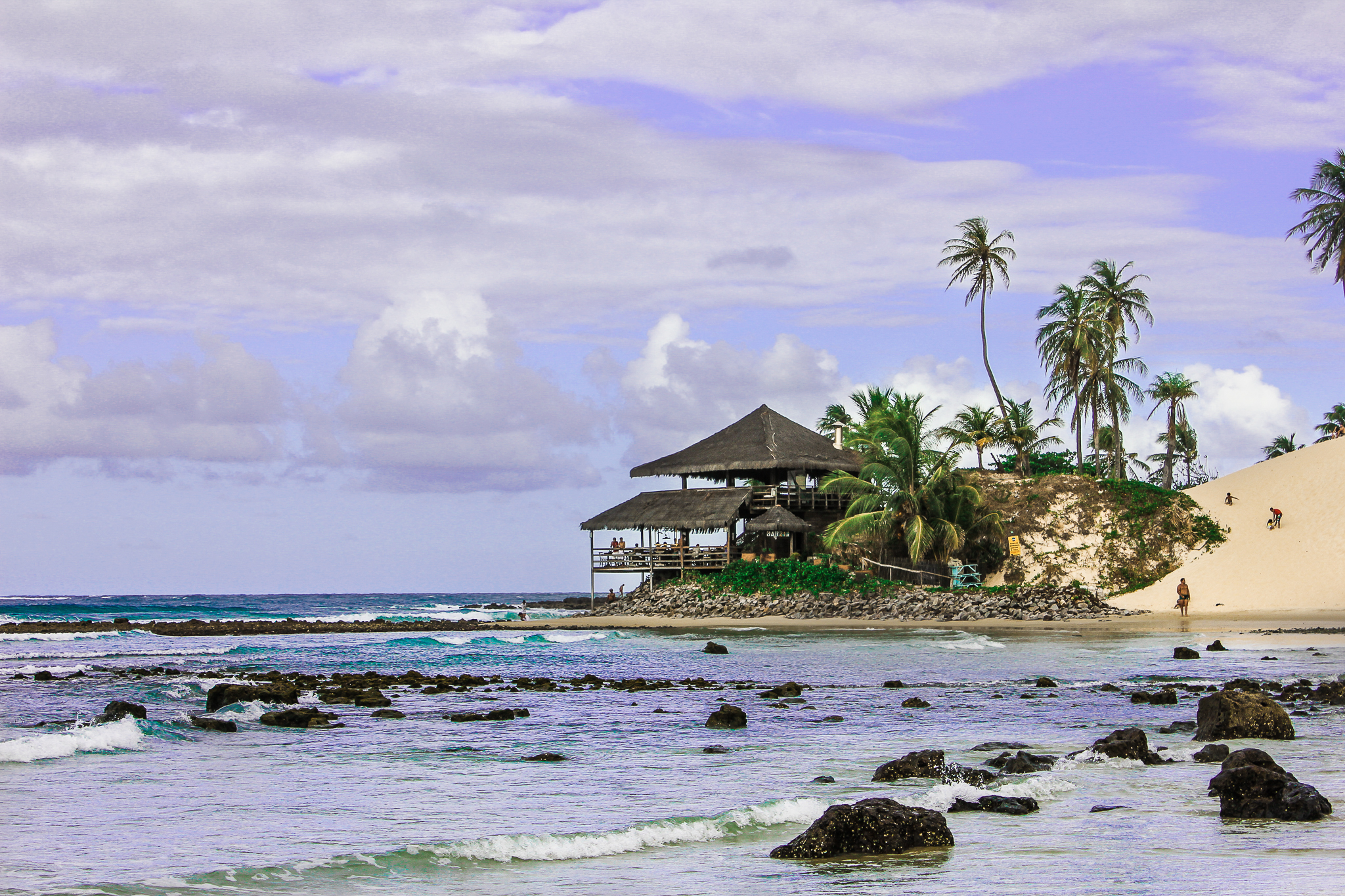 Praia de Genipabu, RN